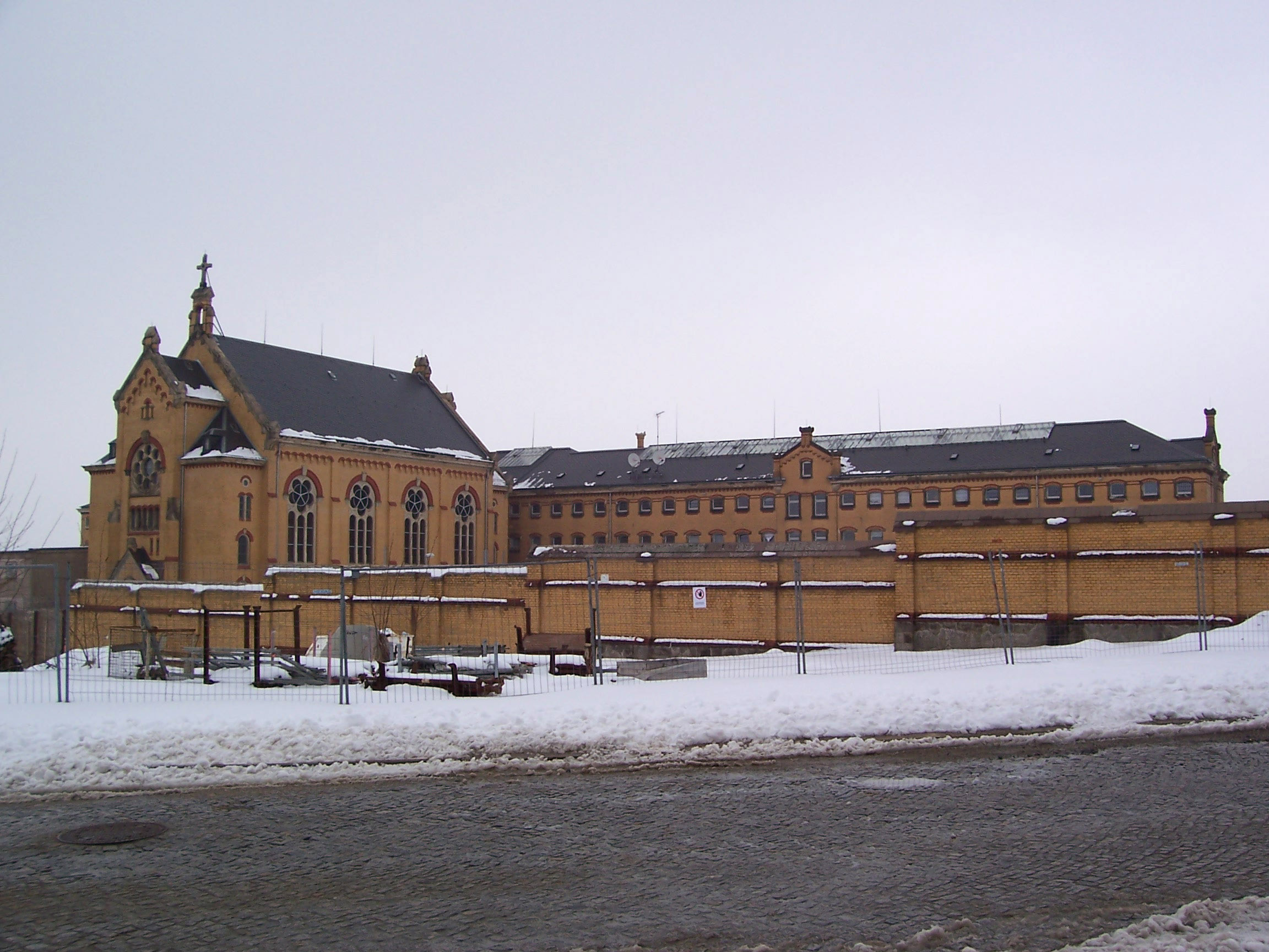 Strafvollzugseinrichtung (StVE) Bautzen - "Gelbes Elend" (Bautzen I)